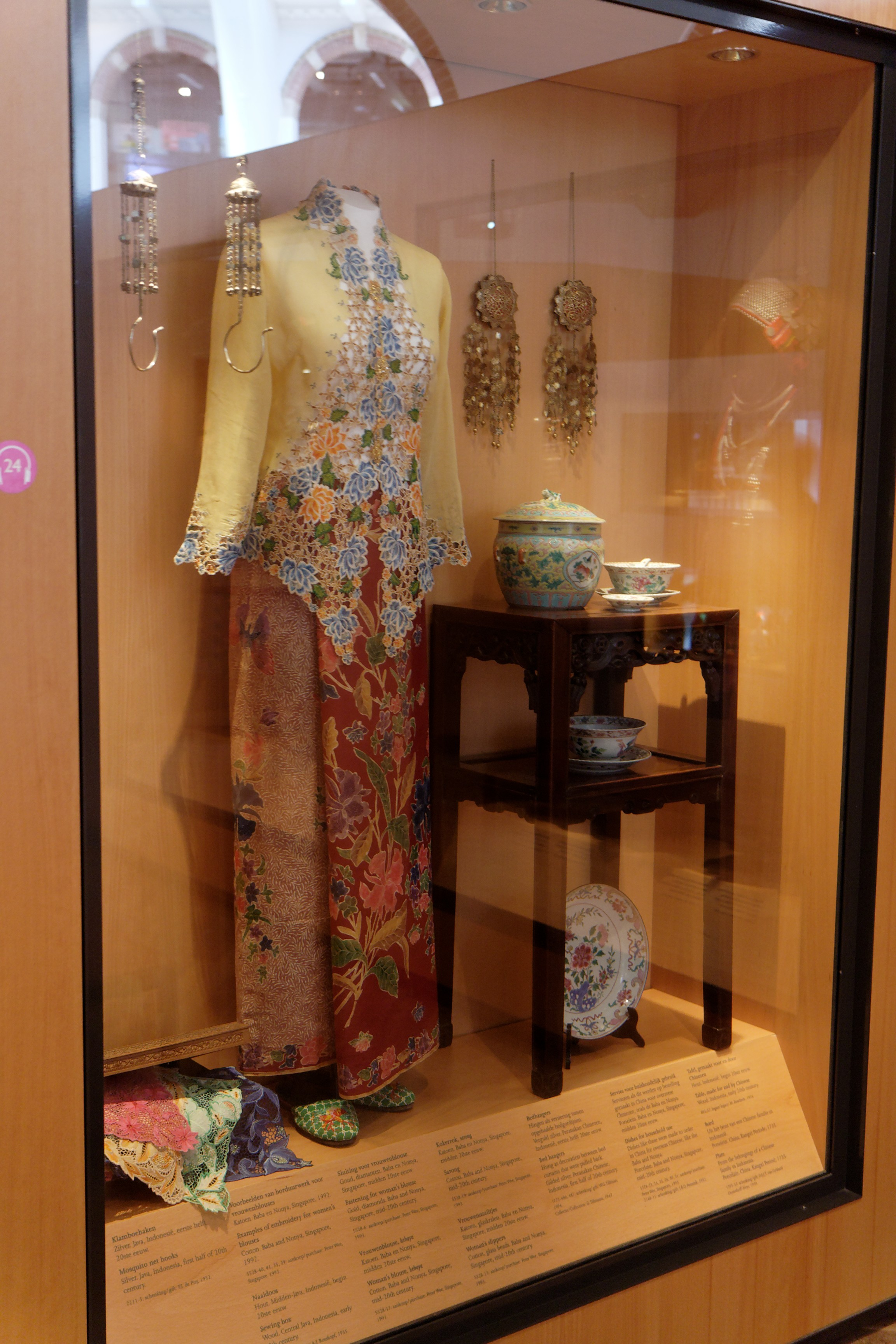 Vitrine Baba Nonya (5528-17/5528-19) 090612-122425_ 0434_350D_raw